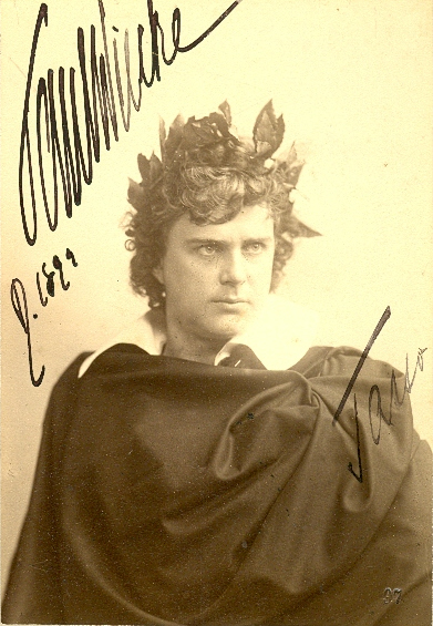 Paul Wiecke Brustbild im Rollenkostüm des Tasso